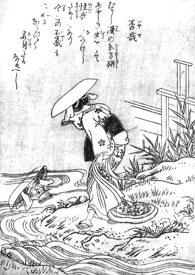 Iyaya (否哉) from the Konjaku Hyakki Shūi (今昔百鬼拾遺)